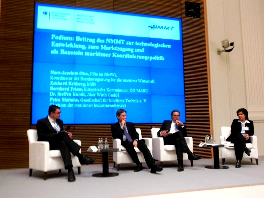 Podiumsdiskussion der 1. Statustagung des Nationalen Masterplans Maritime Technologien mit Hans-Joachim Otto, Eckhardt Rehberg, Bernhard Friess und Petra Mahnke im Konferenzzentrum des Bundesministeriums für Wirtschaft und Technologie in der Invalidenstraße 48, 10115 Berlin, Deutschland